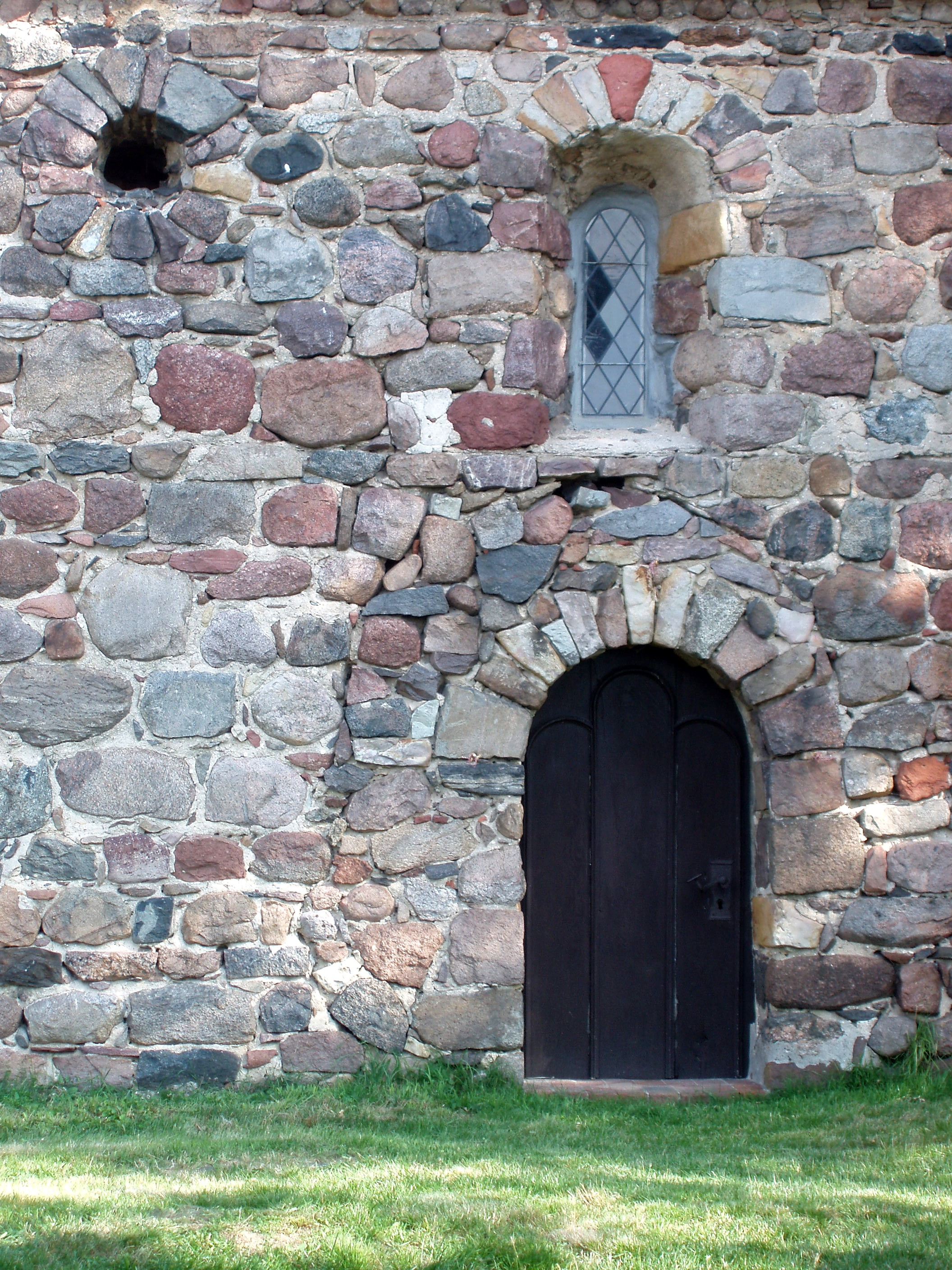 Detail vom Mauerwerk aus behauenen Feldsteinen. Die beim Bau wohl eher nach Passform als nach Färbung aneinander gefügten Feldsteine ließen ein zufälliges Farbenmuster entstehen, das durchaus auch seinen Reiz hat und der Kirche eine Einzigartigkeit verleiht